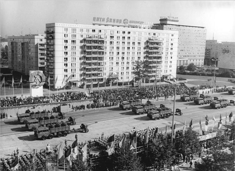 Berlin, 30. Jahrestag DDR-Gründung, Parade ADN-ZB Sturm 7.10.79 Berlin: Ehrenparade Eine Ehrenparade der NVA zum 30. Jahrestag der DDR war am 7.10.79 in Berlin beeindruckender Auftakt des Jubiläumstages. -Eine Abteilung 152-mm-Kanonen-Haubitzen in der Karl-Marx-Allee.